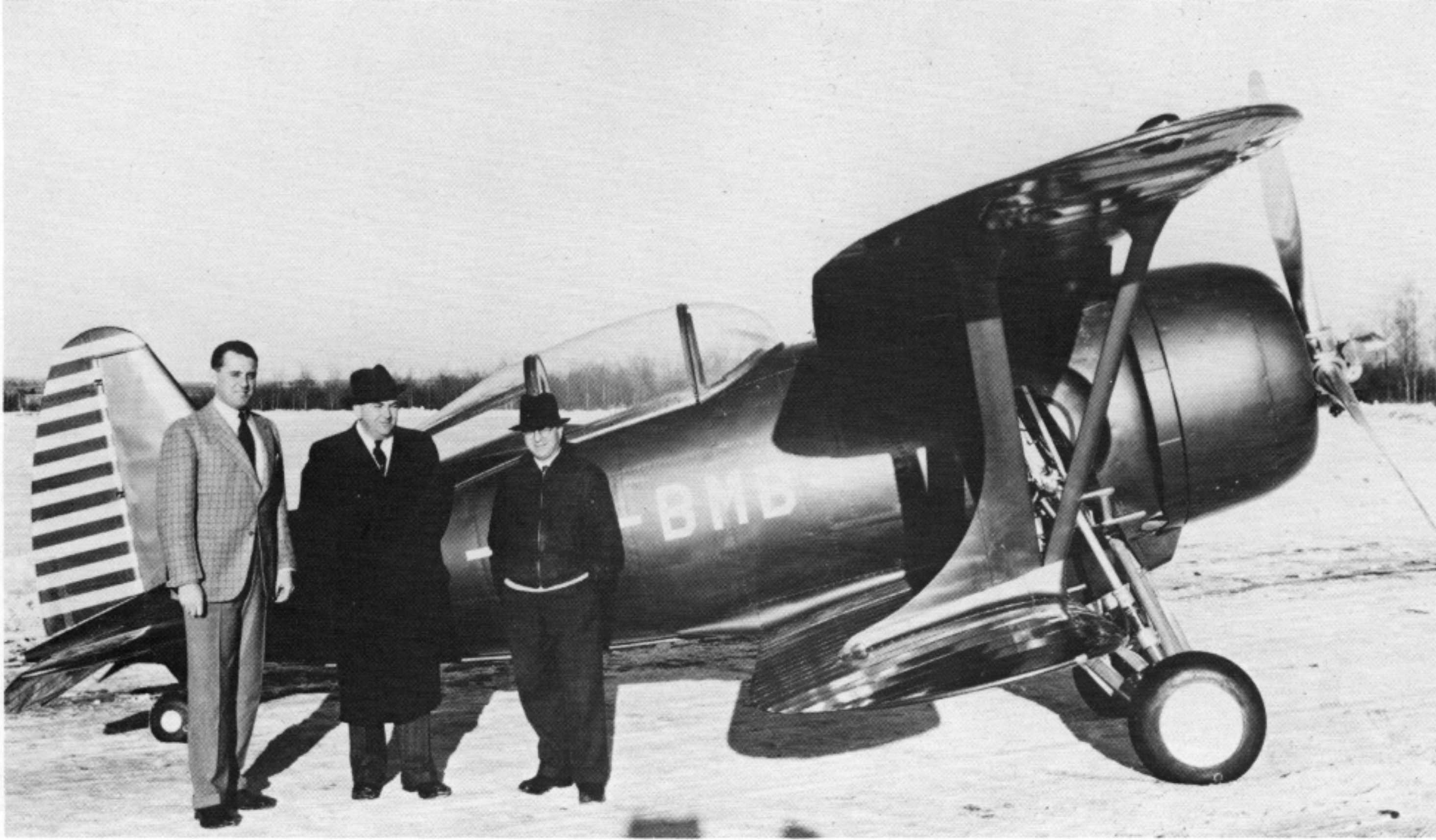 Gregor FDB-1